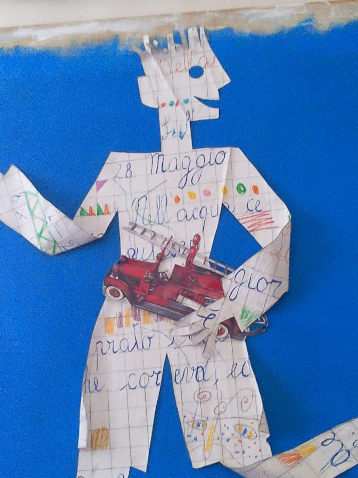 2017, Museo del Giocattolo di Zagarolo